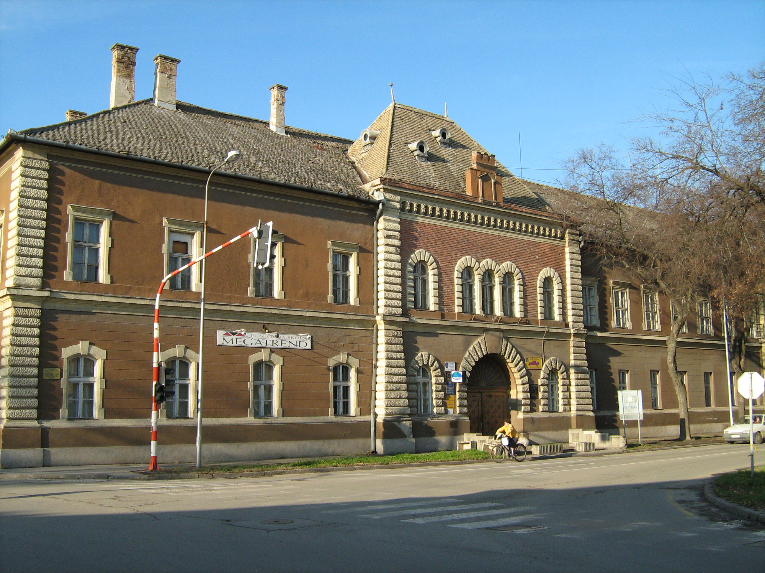 Управна зграда ПК Сомбор